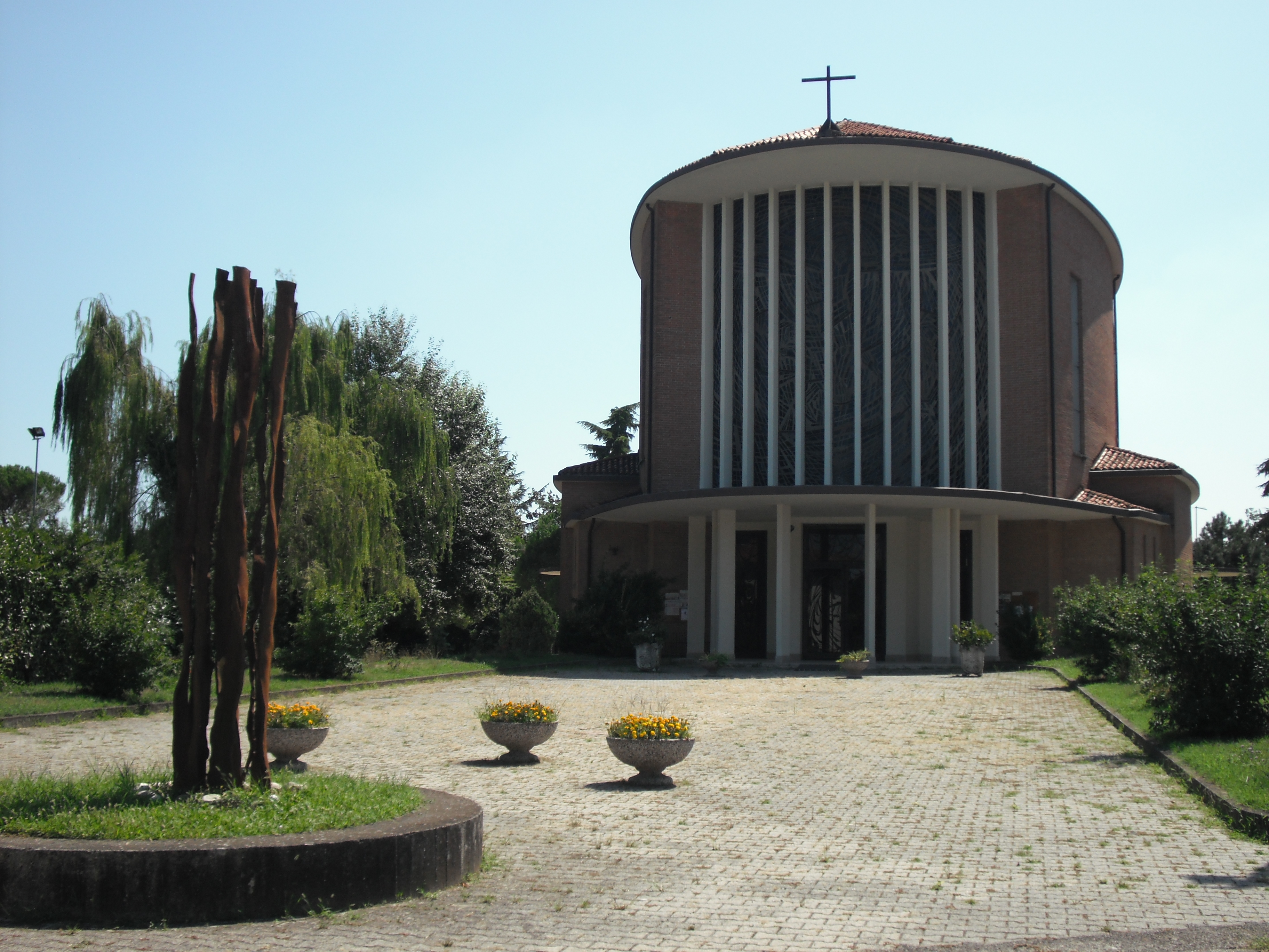 La parrocchiale di Sant'Antonio, a Marocco di Mogliano Veneto.